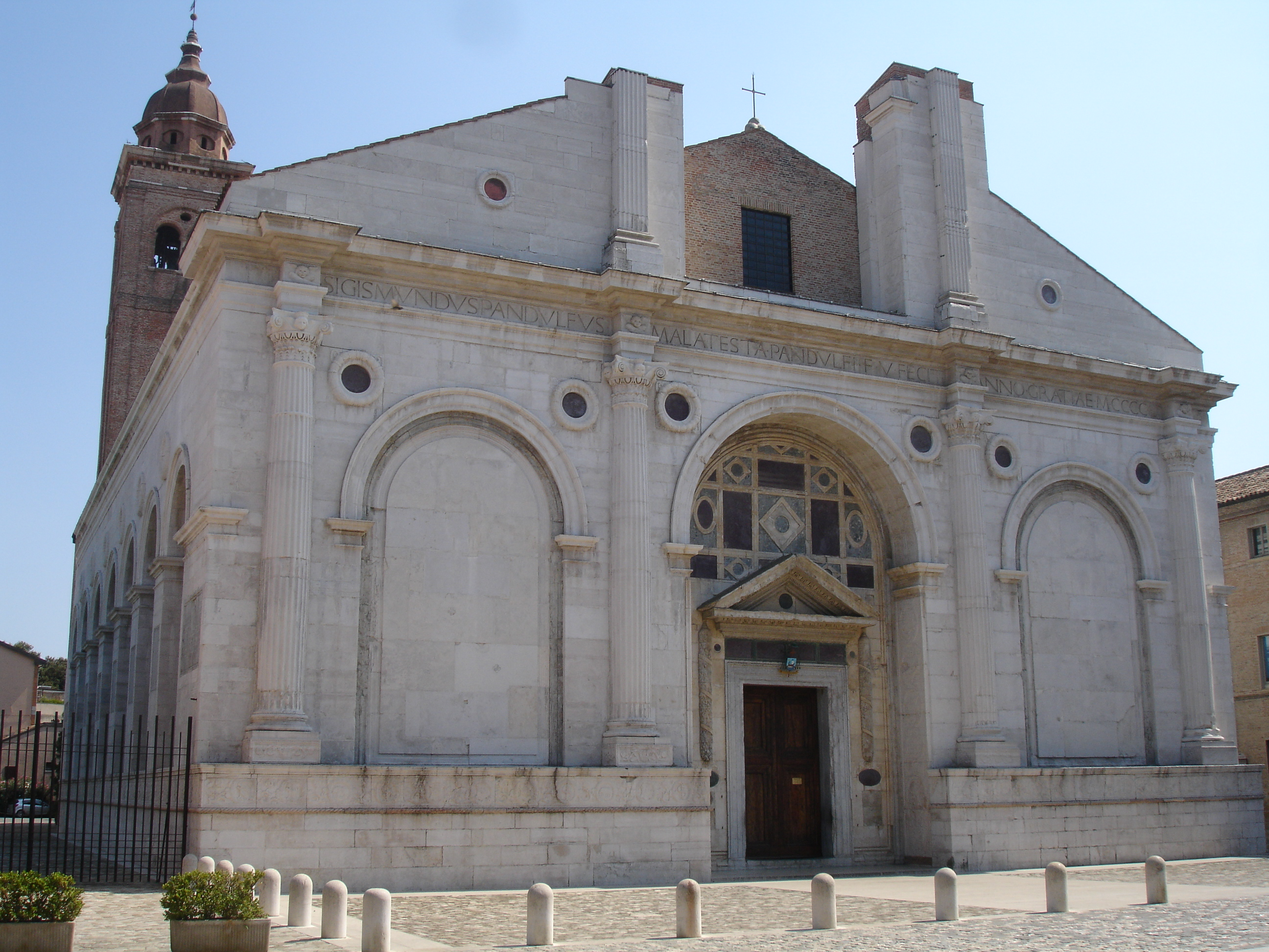 Il Tempio Malatestiano, Duomo di Rimini.